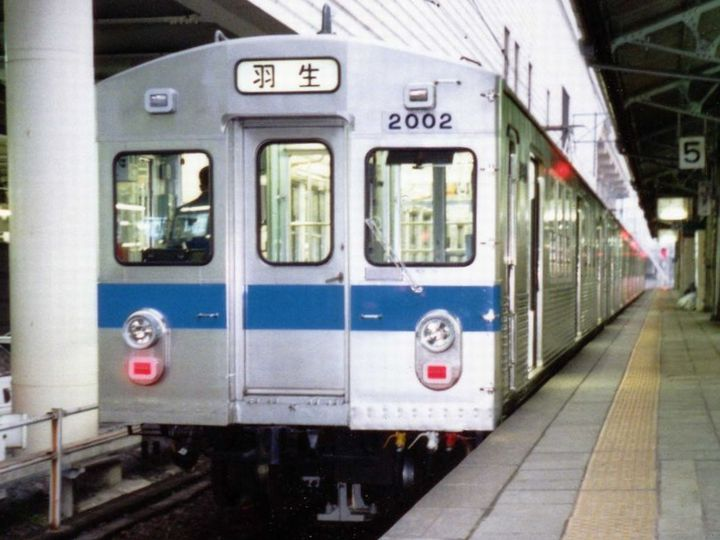 秩父鉄道2000形電車 1992年頃 熊谷駅にて 投稿者が撮影したものをスキャン 秩父鉄道2000形電車,1992年頃 熊谷駅にて,投稿者が撮影したものをスキャン